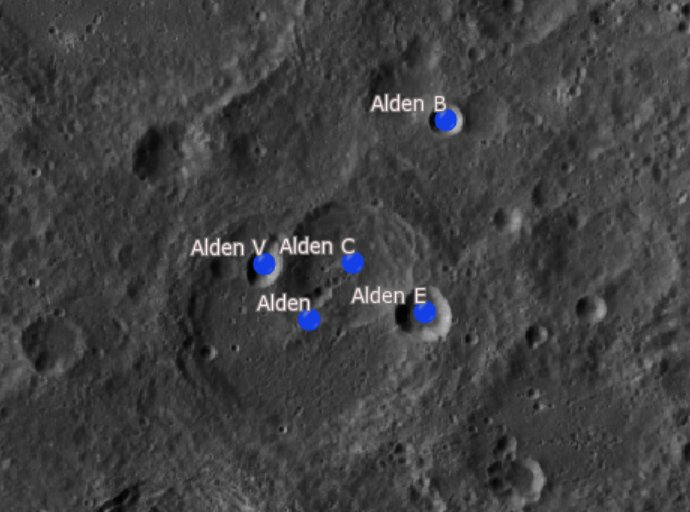 Cráter lunar Alden. Cráteres satélite. (Imagen LRO)